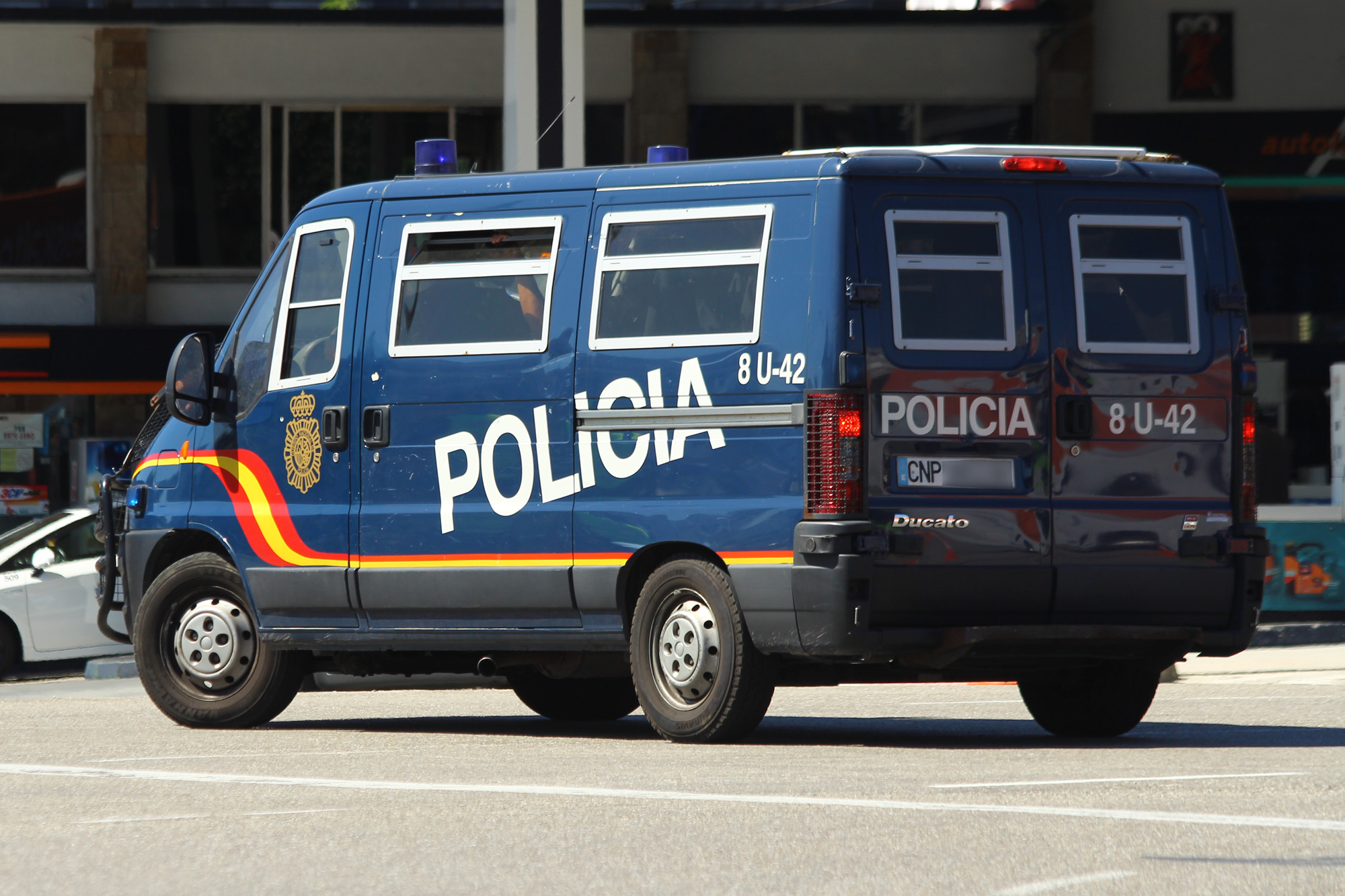 Furgón UIP perteneciente al Cuerpo Nacional de Policía de España